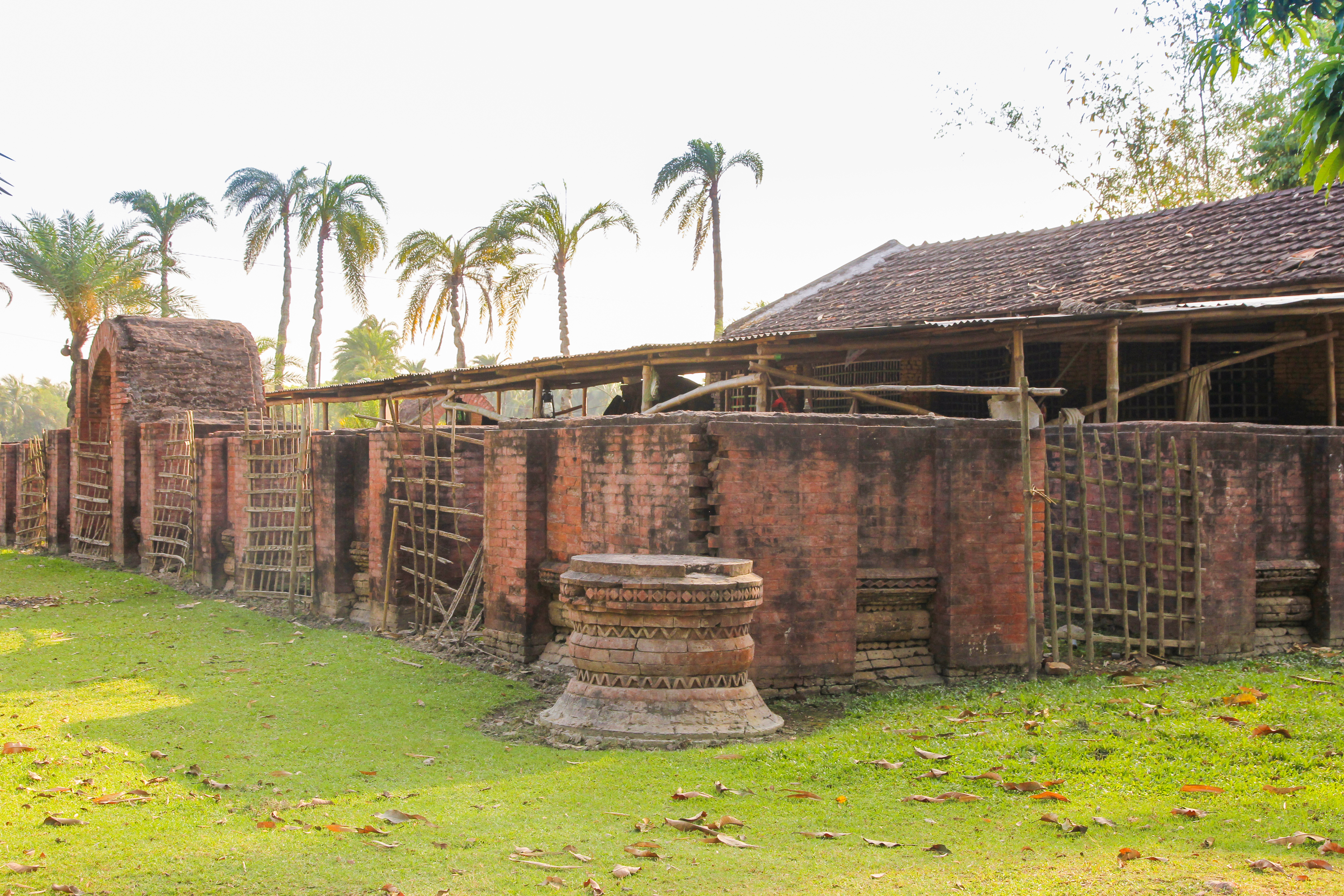 সাতগাছিয়া গায়েবানা মসজিদ